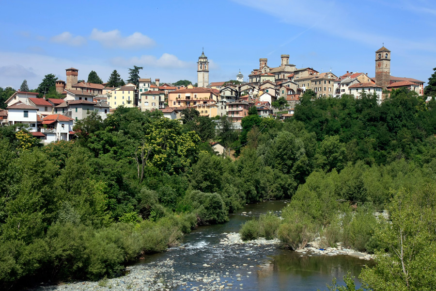 Panorama di Molare sulle rive del Torrente Orba